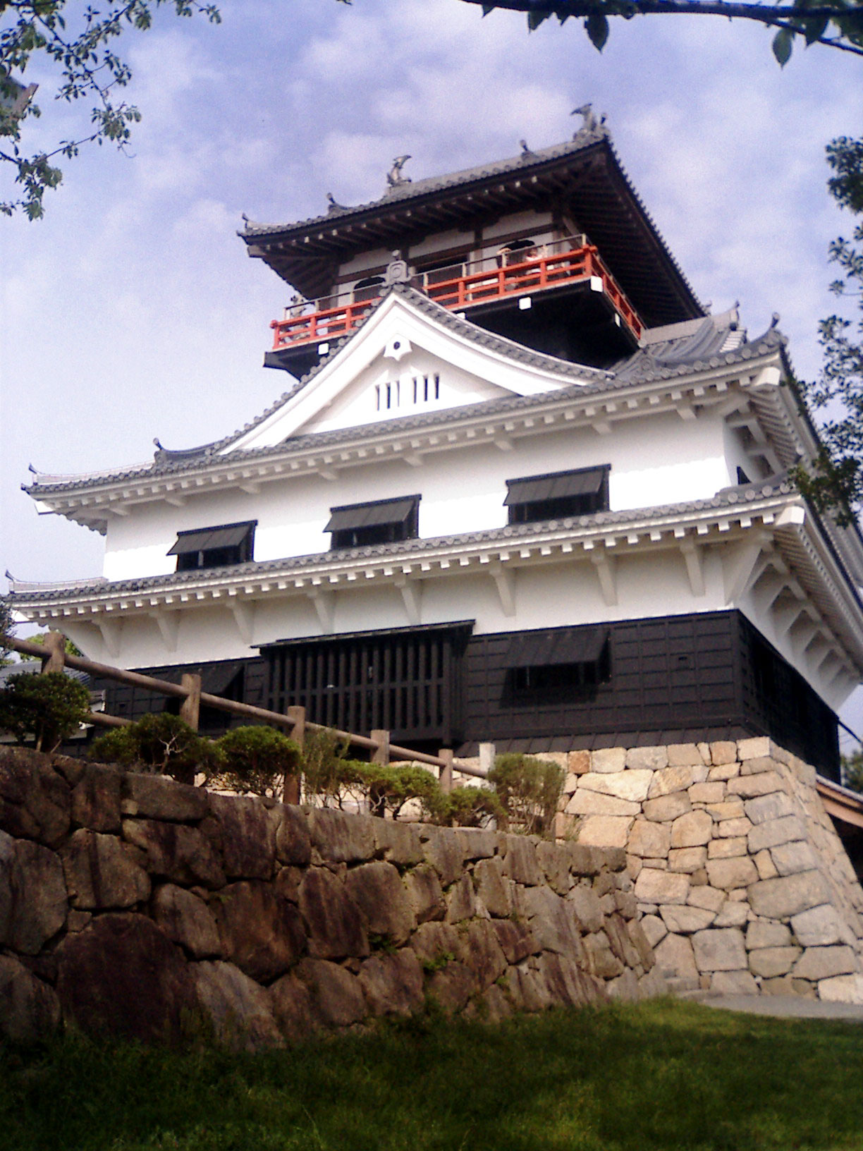 川之江城（復元施設）：（日本国愛媛県四国中央市）